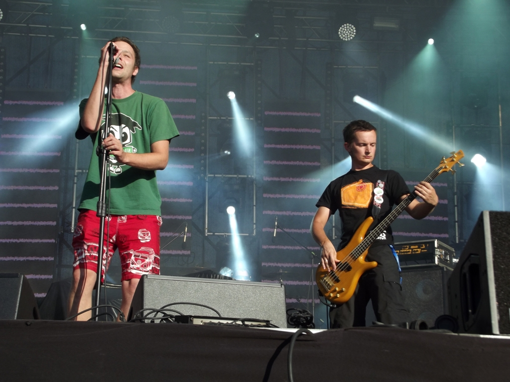 Zdjęcie zrobione podczas Festiwalu Energii, nad zalewem Sosina w Jaworznie.